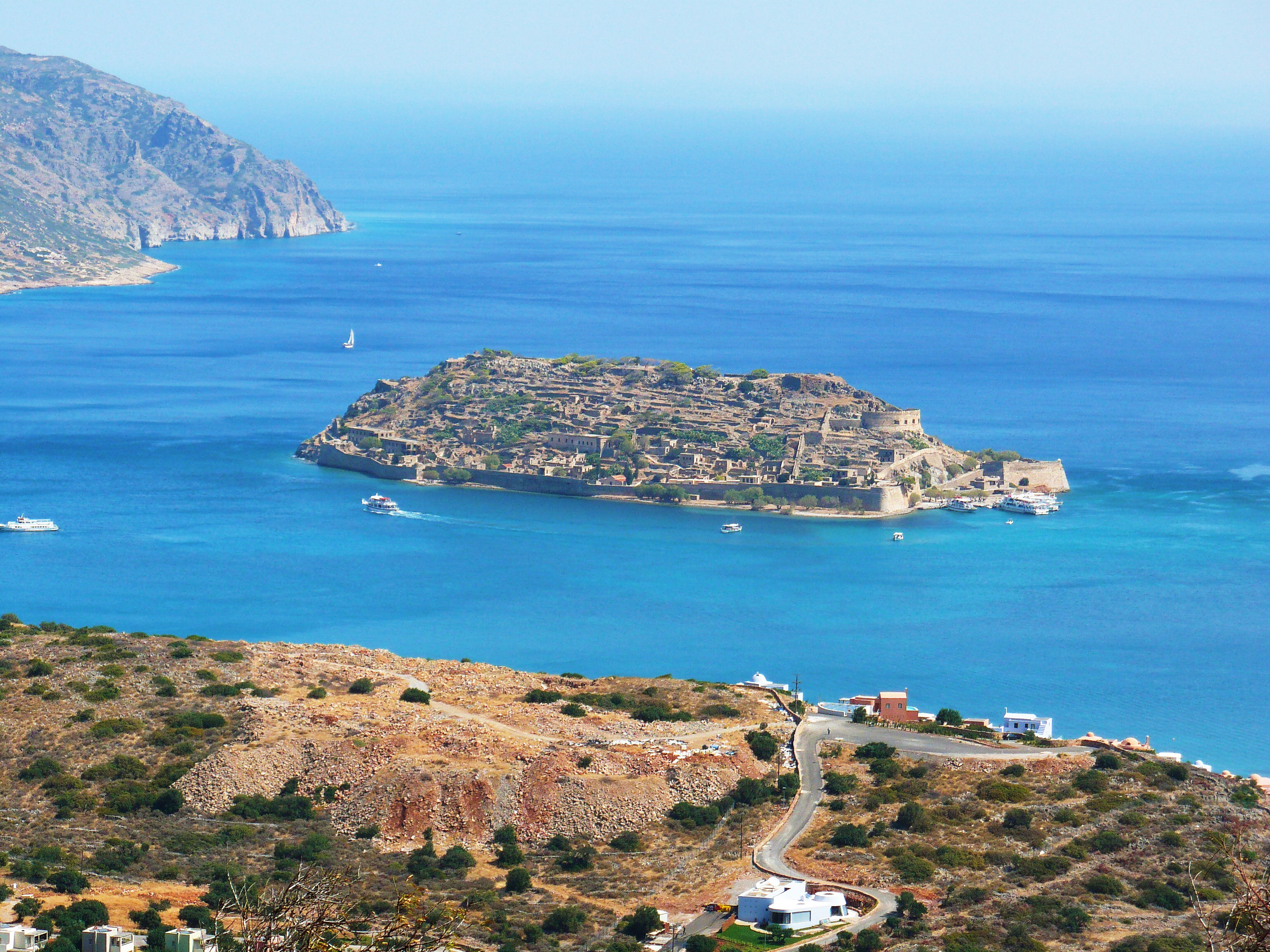 wyspa Spinalonga